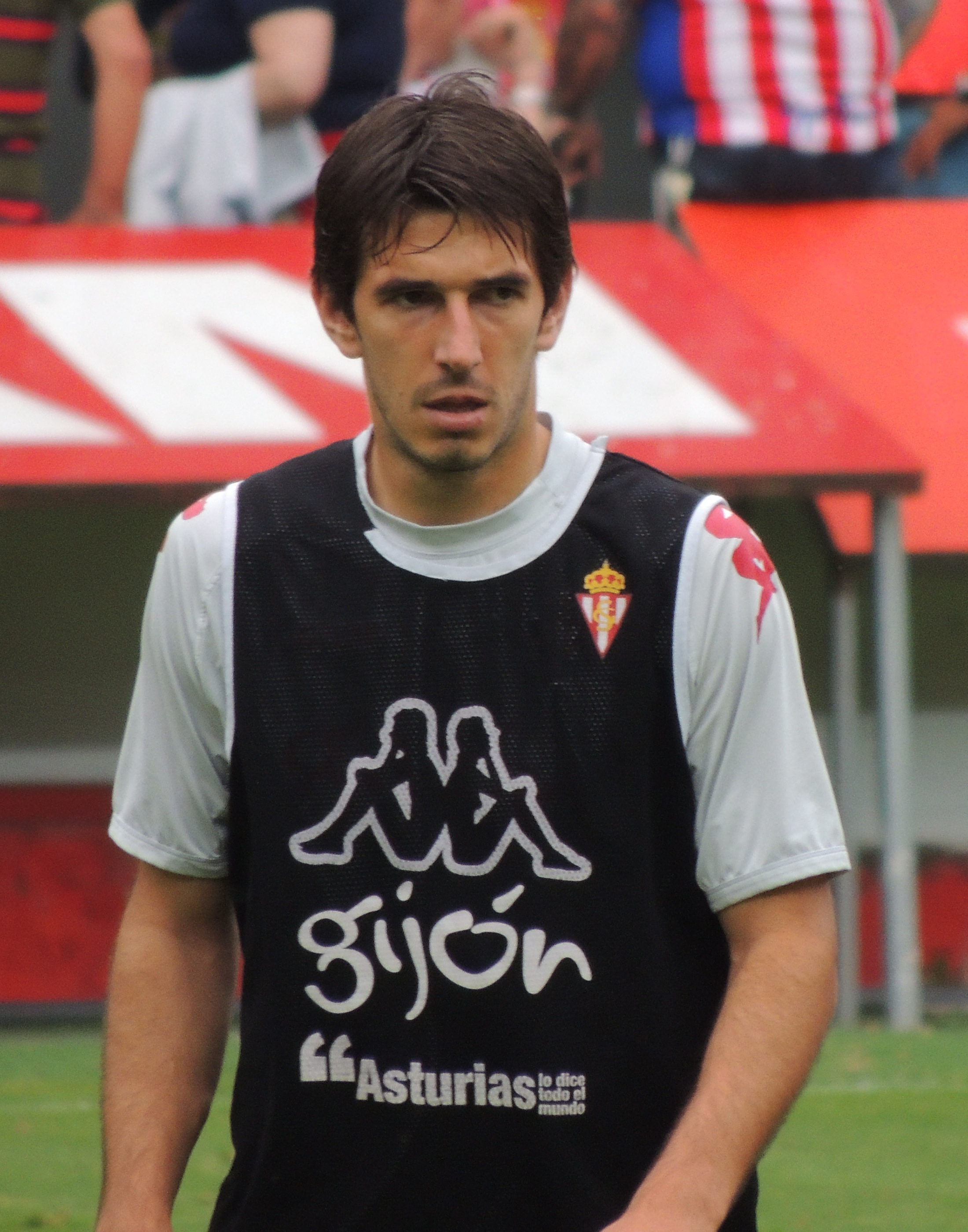 Calentamiento previo a partido contra UD Las Palmas en El Molinón.